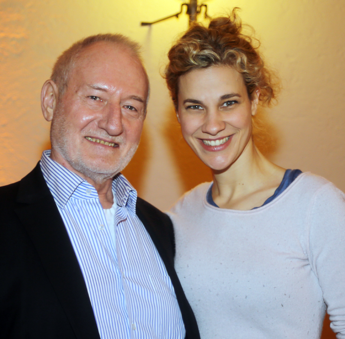 Sepp Schauer und Birte Wentzek, SchauspielerInnen - hier am 2.03.2015 im Alten Rathaus München